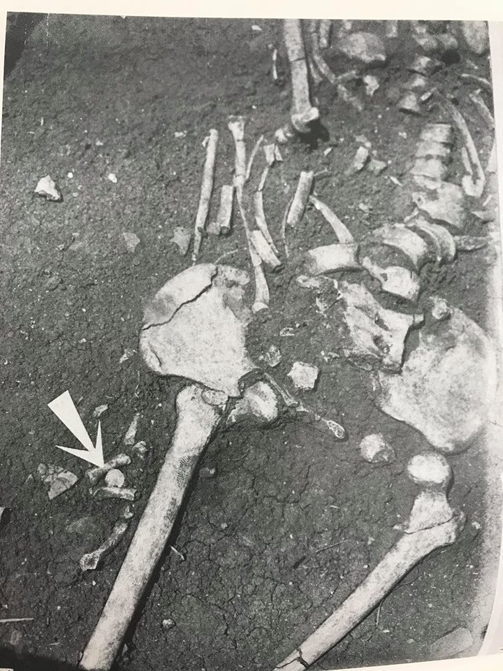 Obol mrtvých, Morava. Mrtvý držel v pravé ruce český denár. Zdroj : Em. Nohejlová-Prátová, Základy numismatiky, Tab. 38